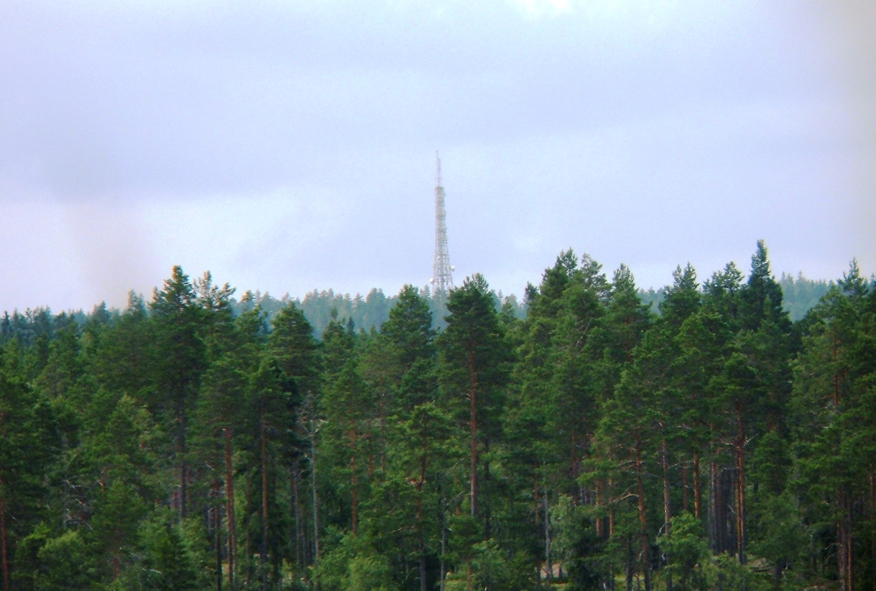 Runddelen ved Lierfoss i Aurskog-Høland kommune.